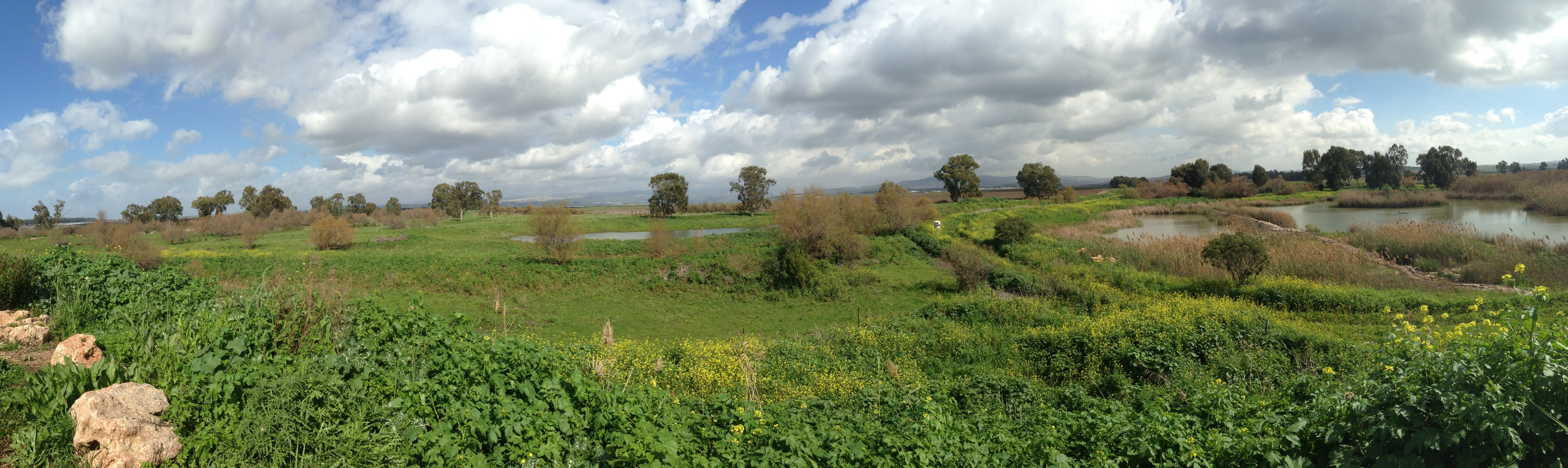 צילום פנורמי של הנוף בשמורת הטבע עין אפק